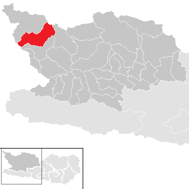 Bezirk Spittal an der Drau